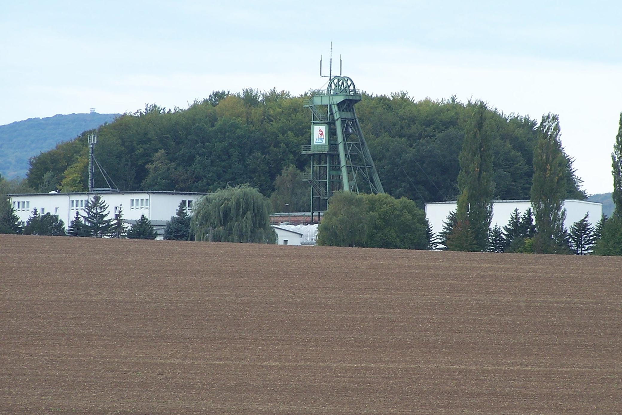 Kali-Schachtanlage bei Mühlwärts der K&S AG, Ansicht von Osten.